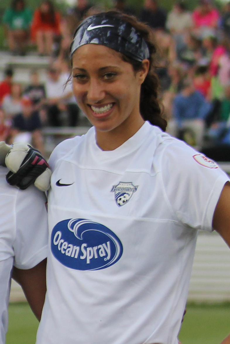 Melinda Mercado (Boston Breakers)